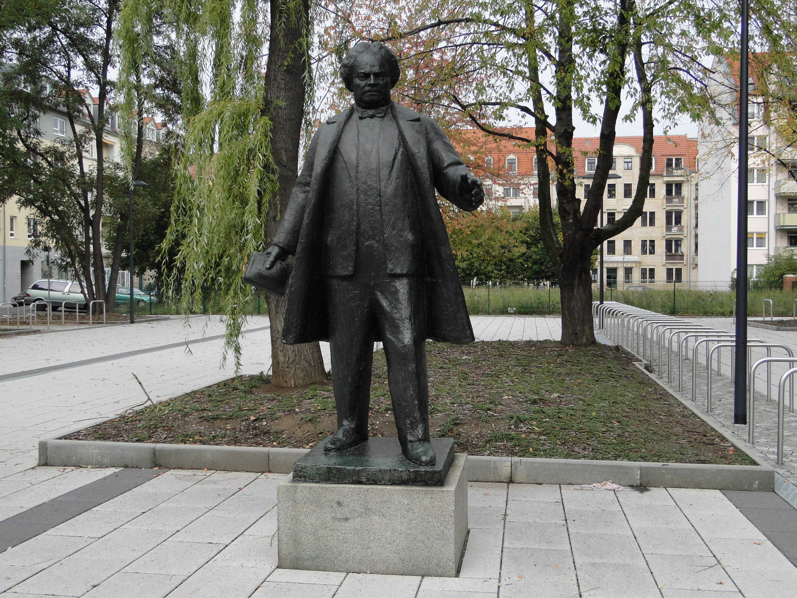 Skulptur Martin Andersen Nexös von Rudolf Löhner vor der MANOS in Dresden